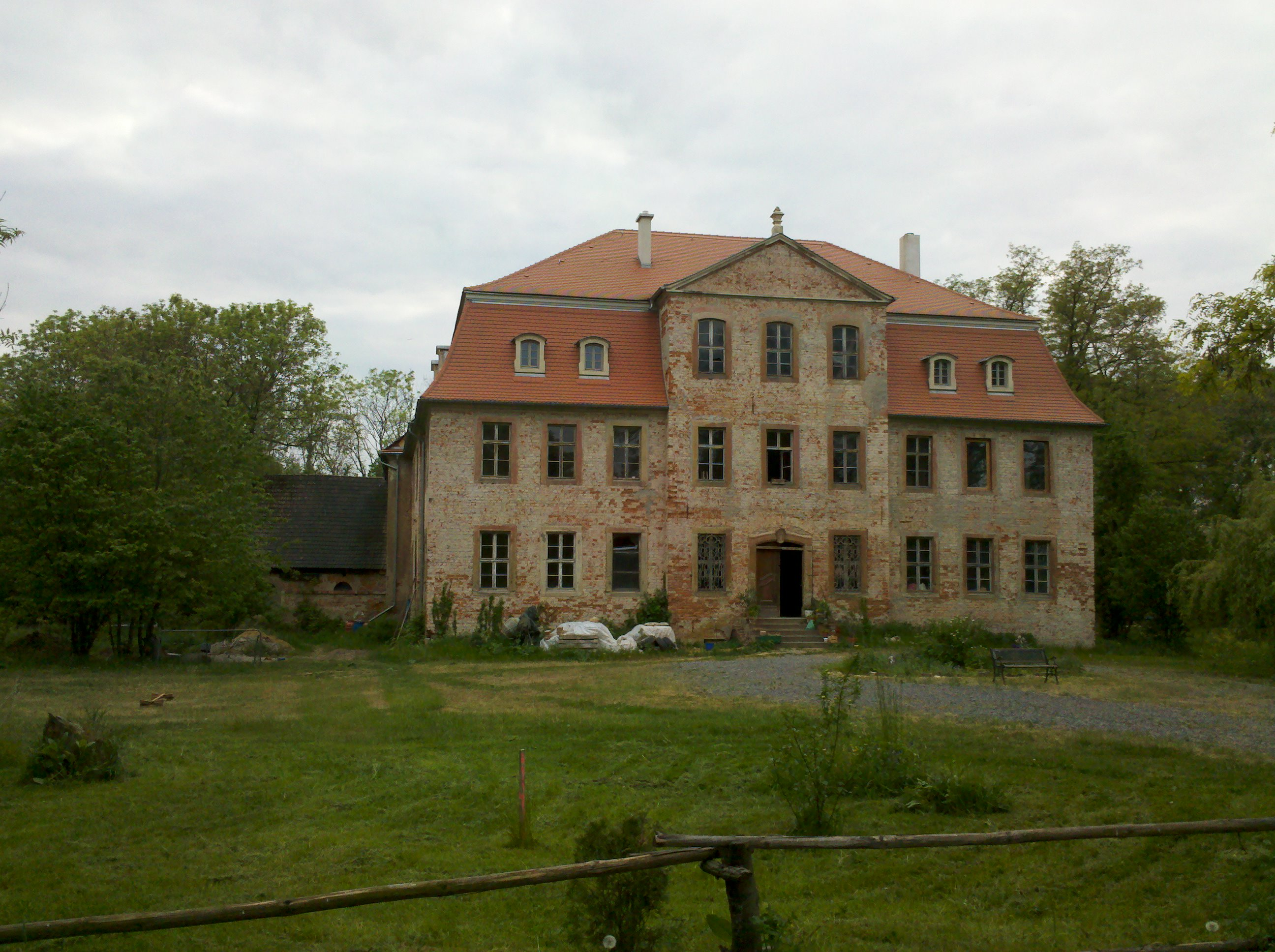 Audigast - Schloss Audigast, erbaut 1753, abgelichtet im Mai 2016